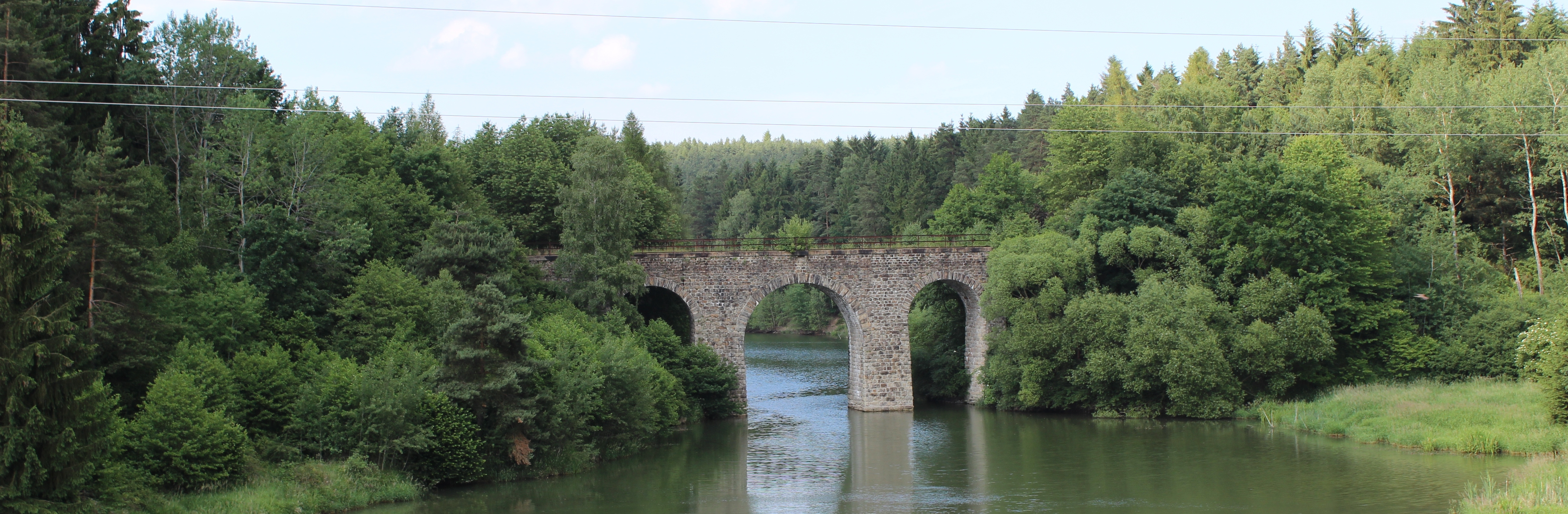 Bývalý železniční viadukt u Němčic, části Lokte v benešovském okrese (pohled od jihozápadu).